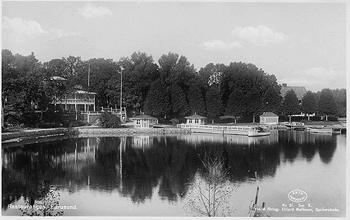 Furusund, Societetshuset